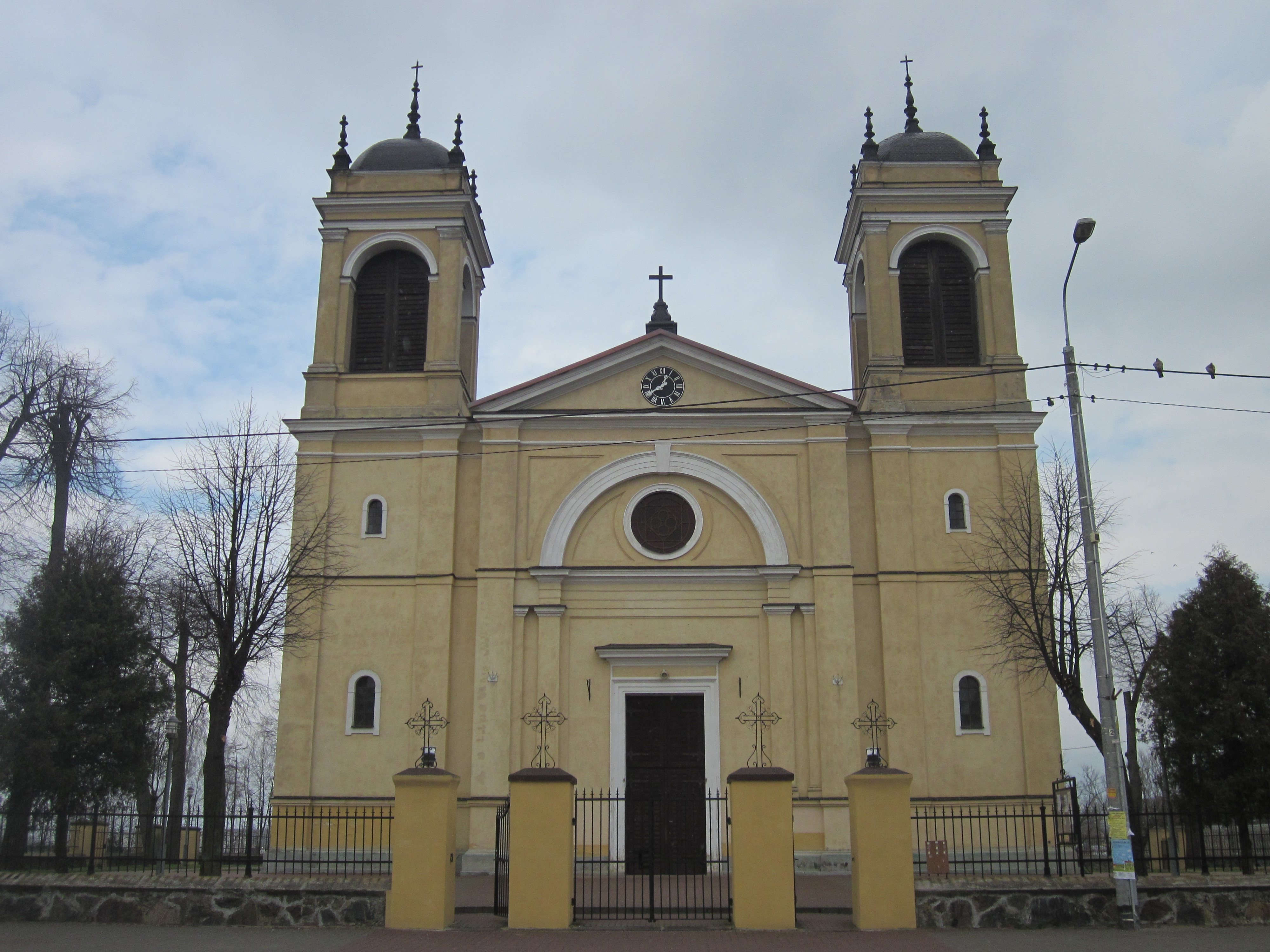 ul. Duży Rynek 15